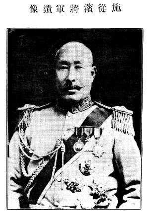 中文（中国大陆）: 施從濱將軍